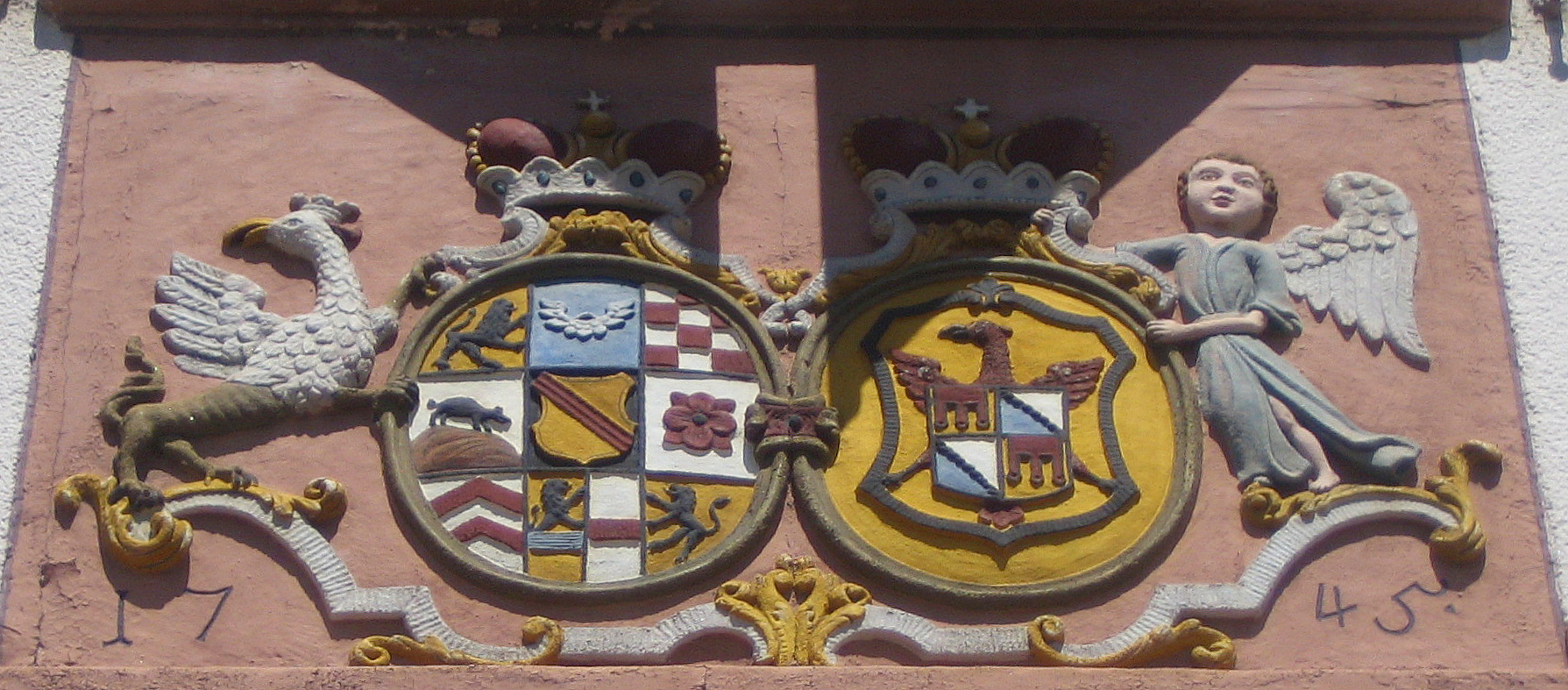 Wappen der Markgrafen von Baden und der Grafen von Fürstenberg am "Ladhof" in Elzach, dem ehemaligen gemeinsamen Amtsgebäude im Kondominat Prechtal.